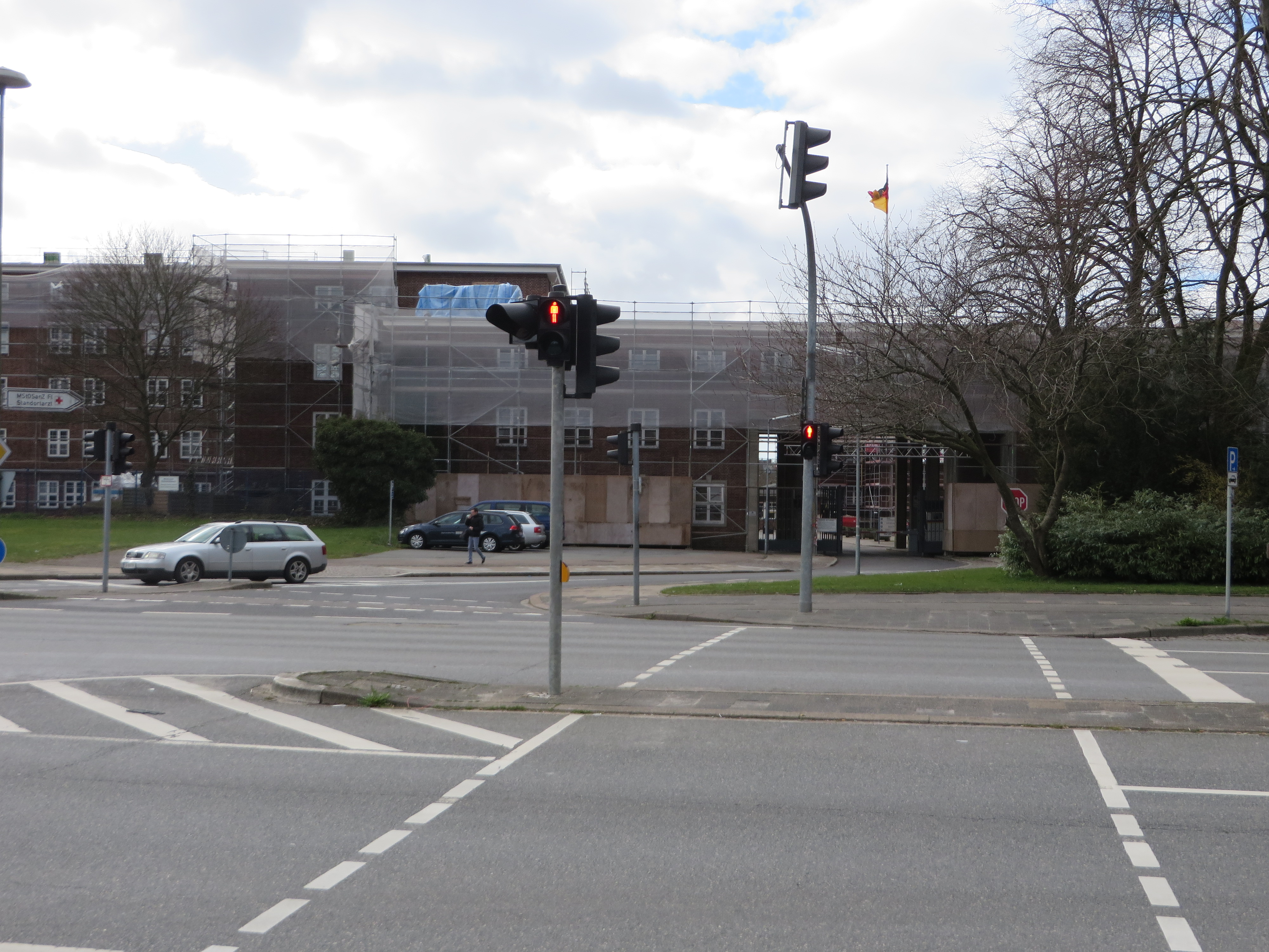 Nachrichtenschule Flensburg-Mürwik, Gebäude-Renovierung 2015, Bild 06